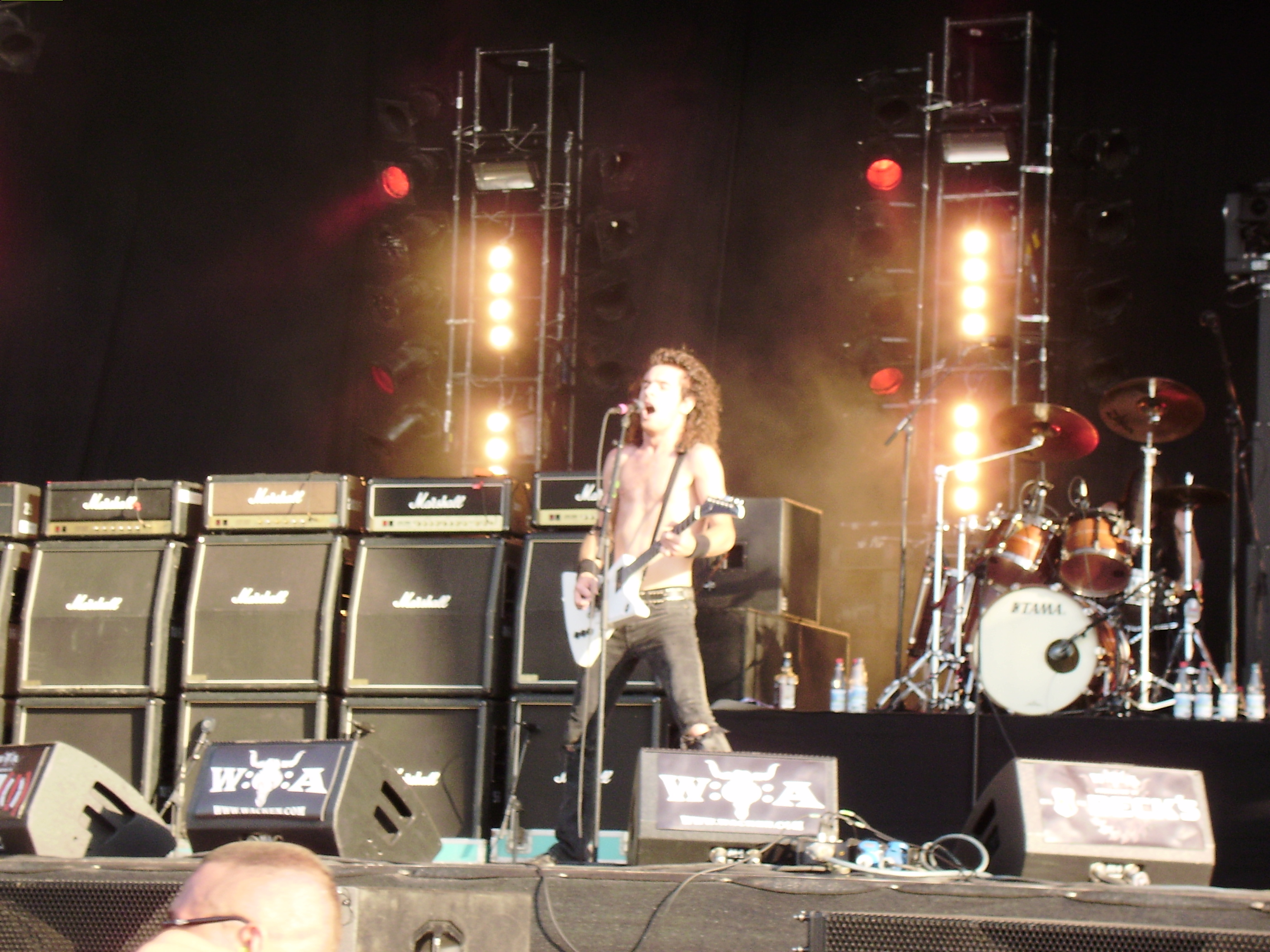 Joel O'Keeffe, cantante degli Airbourne, live al Wacken Open Air 2008.